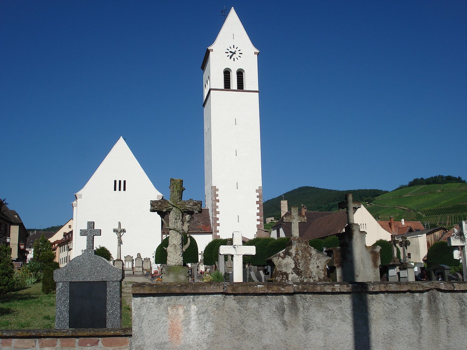 Église Saint-Nicolas de Katzenthal, dép. Haut-Rhin, France. Nef de 1719, clocher de 1895. Remarquer le château du Wineck à l'arrière-plan, un peu à droite du clocher.